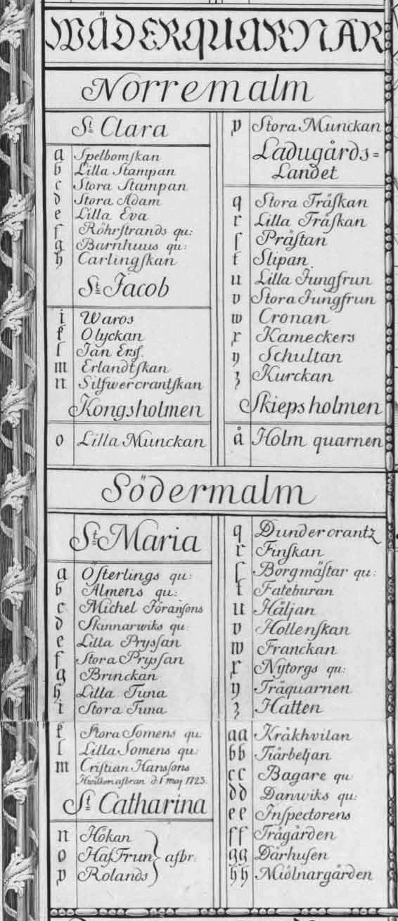 Förteckning över Stockholms kvarnar på Petrus Tillaeus karta från 1733